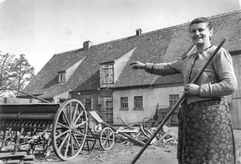 Althaldensleben, Neubauernhaus Illus Biscan Leu-Leu. 8.6.51 Neubauer Anton Plescher aus Althaldensleben b-Magdeburg. Der Umsiedler und Neubauer Anton Plescher aus Althaldensleben-Magdeburg hat in den vergangenen 2 Jahren als einer der ersten für alle Produkte sein Ablieferungssoll erfüllt und übererfüllt. Er hat schon in vielen Bauernversammlungen gesprochen, eine öffentliche Diskussion mit Agrarwissenschaftlern angeregt und die Anwendung der Methoden von Mitschurin und Lyssenko vorgeschlagen. UBz: "Das ist unser neues Haus", erklärt Frau Marie Plescher stolz. Die Familie Plescher hat in der Deutschen Demokratischen Republik eine neue Heimat gefunden.